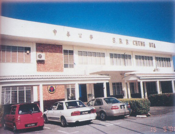 民都魯中華公學行政樓